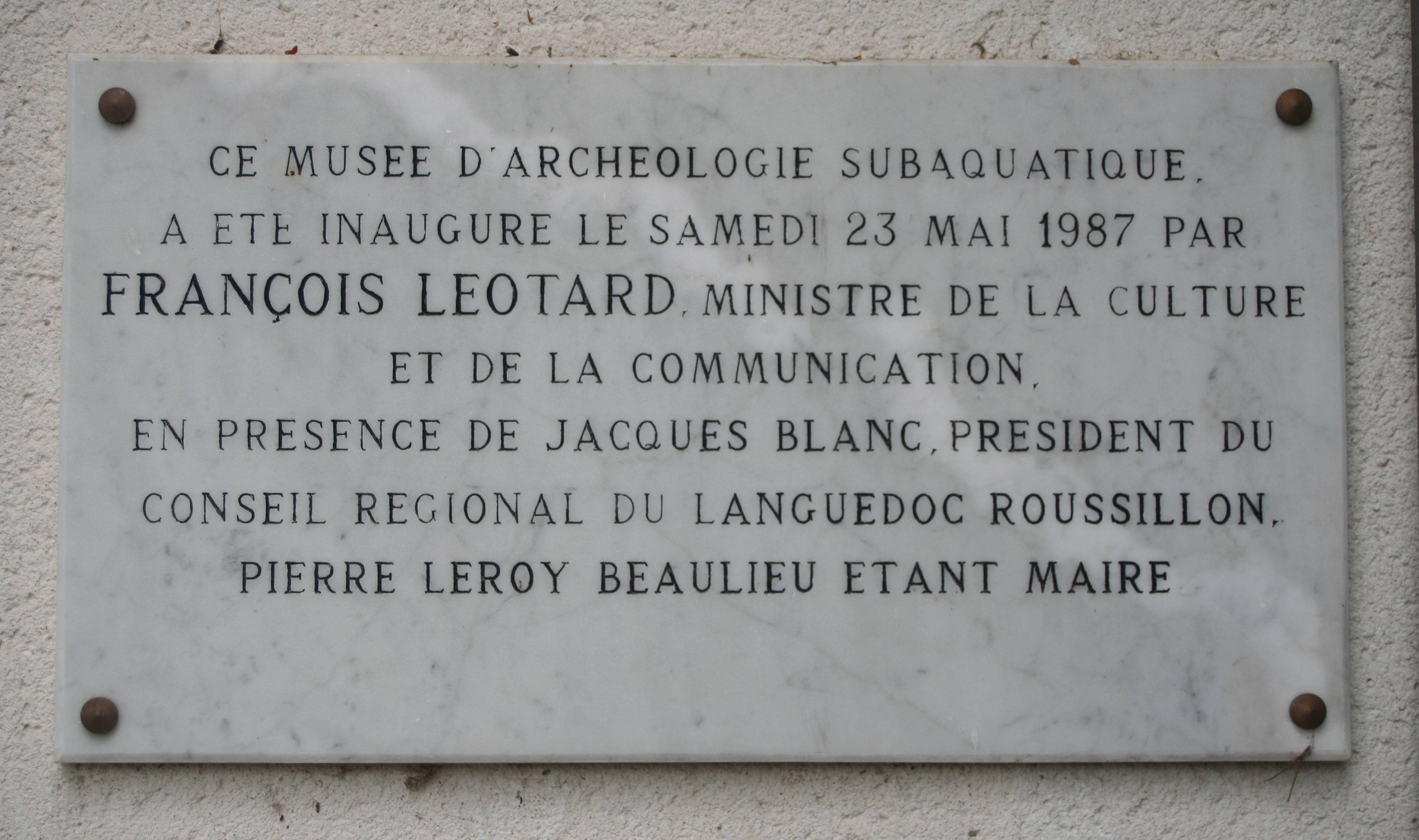 Plaque commémorative de l'inauguration du musée de l'Éphèbe au Cap d'Agde (Hérault, France)